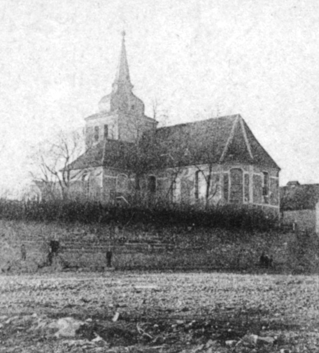 Sankt Stephanus Kirche Westerhüsen